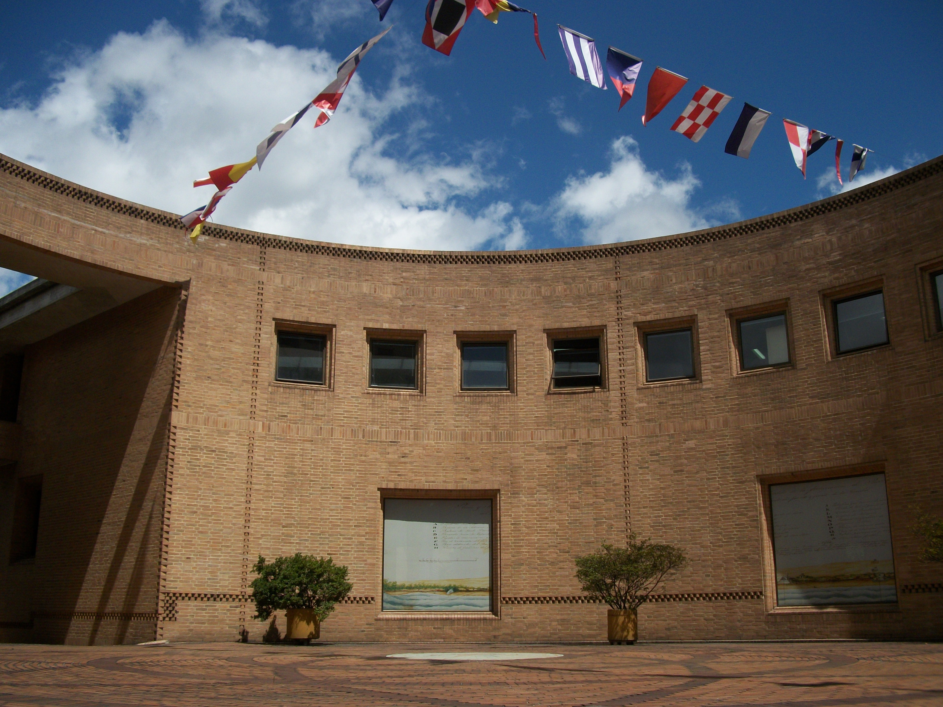 Plaza interior del Archivo General de la ´Nación en Bogotá.